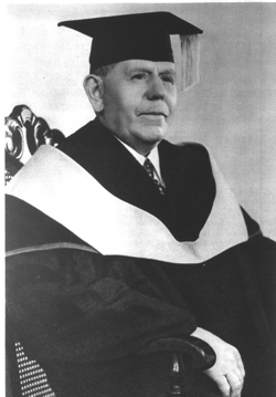 Carl Edvard Johansson, Sweden